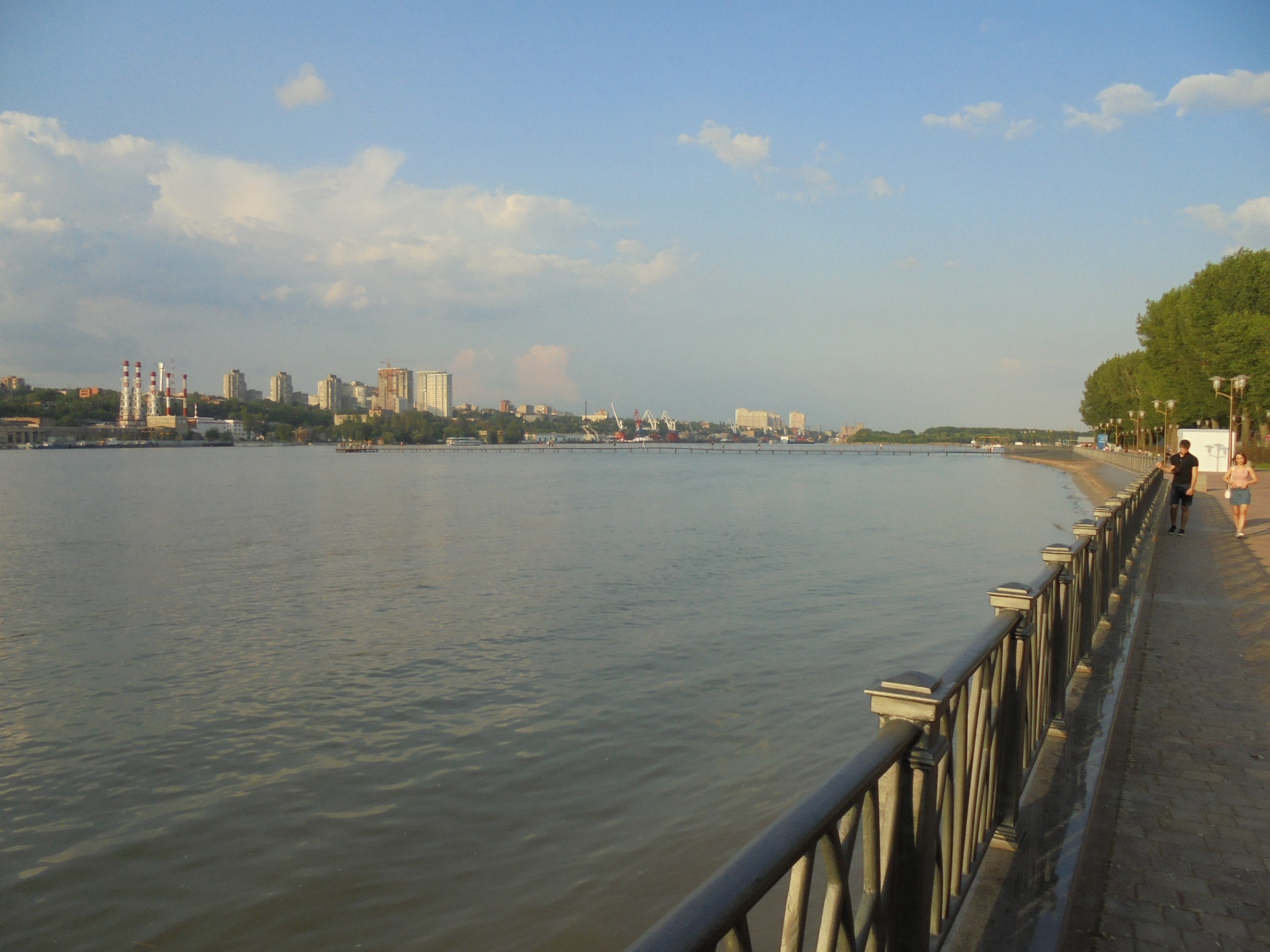 Ростов-на-Дону, парк "Левобережный", вид на Дон (вверх)